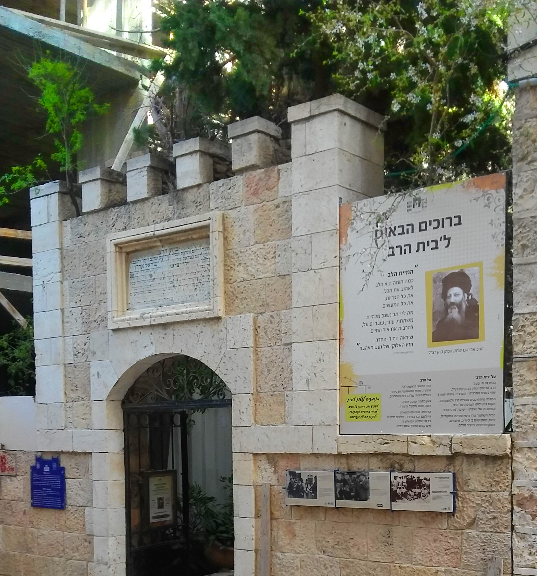 שער הכניסה לחצר בית הרב קוק